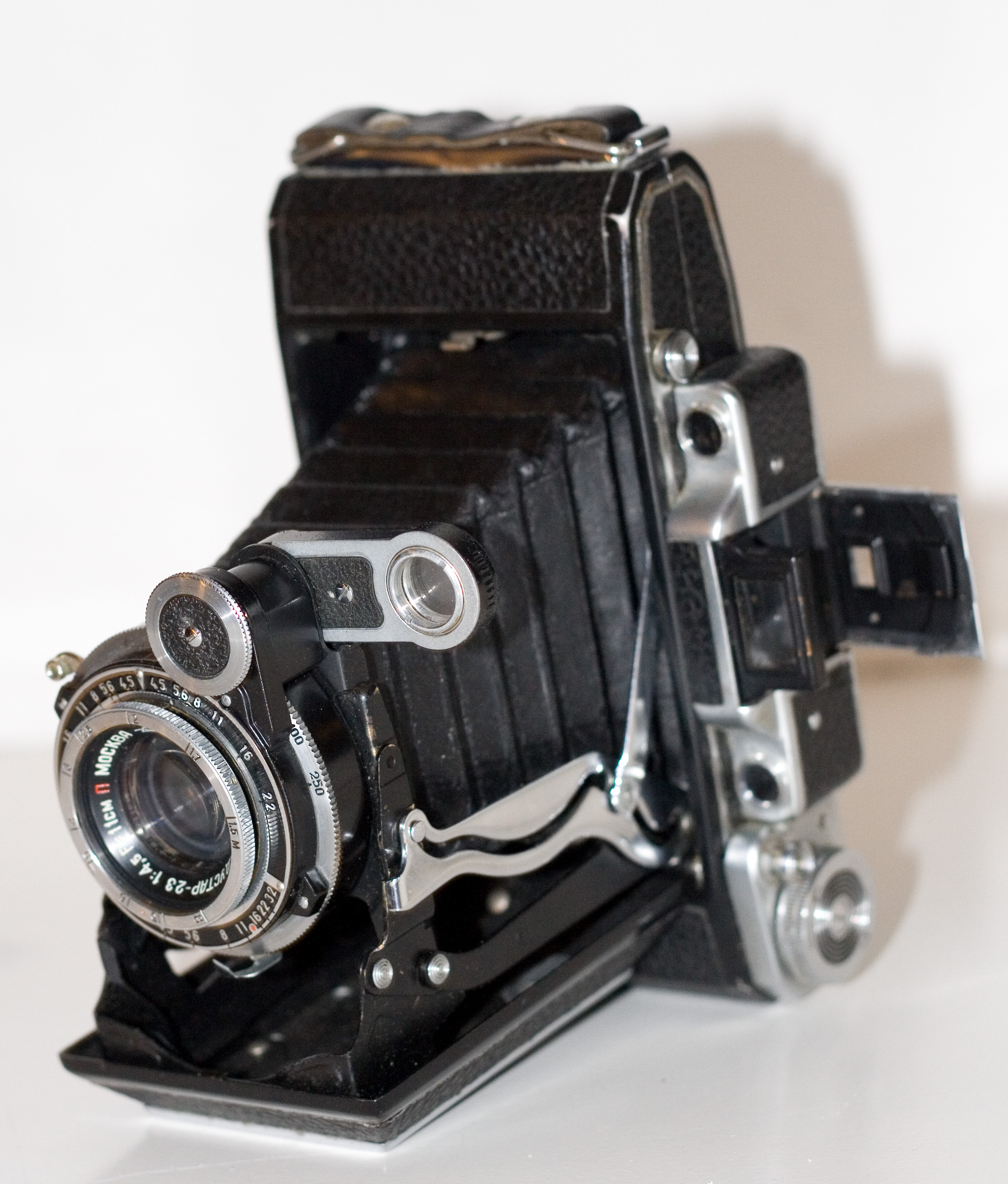 "Moskva-2" camera